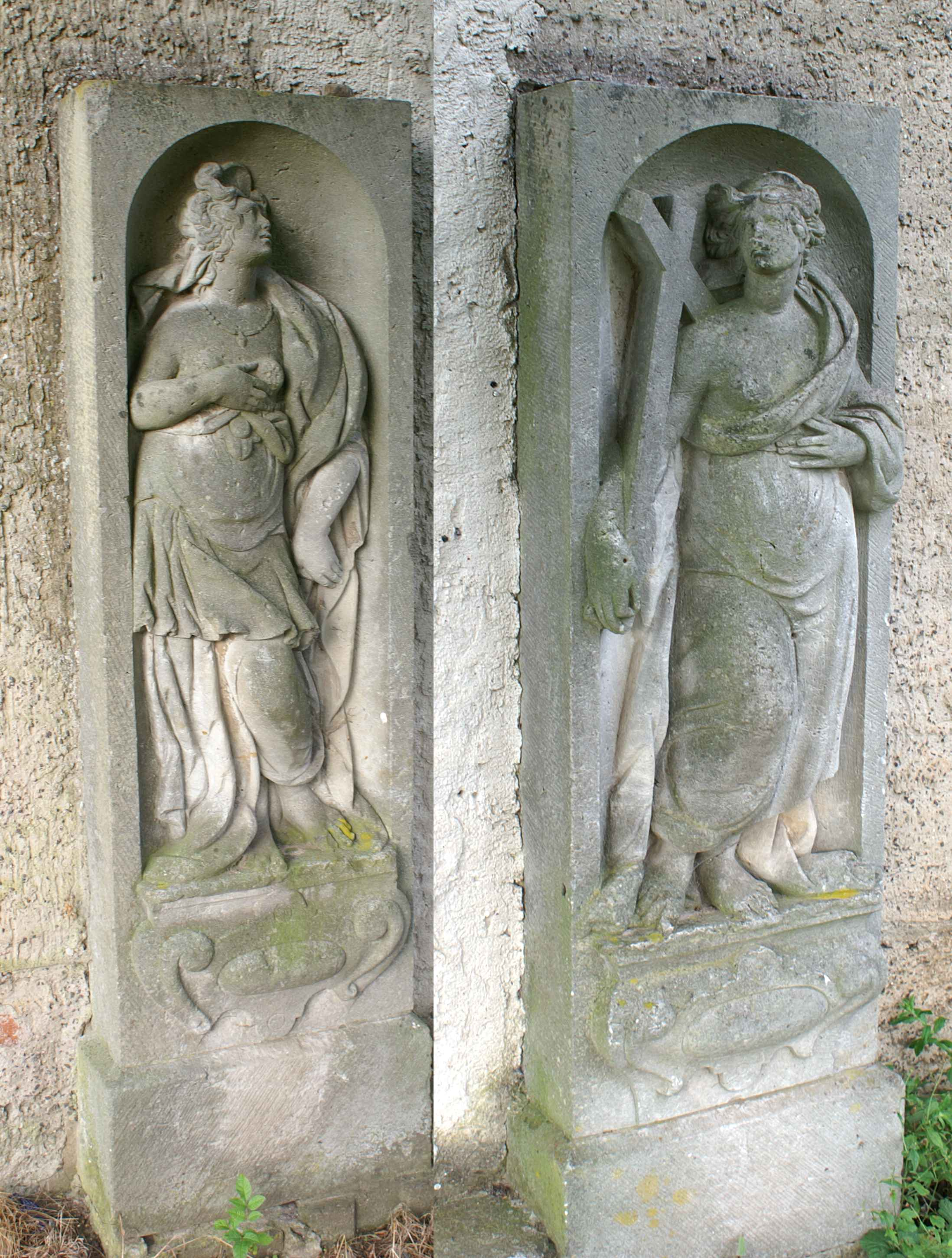 Wrangelsburg - Landkreis Ostvorpommern - Herrenhaus, Skulpturen am Nebengebäude